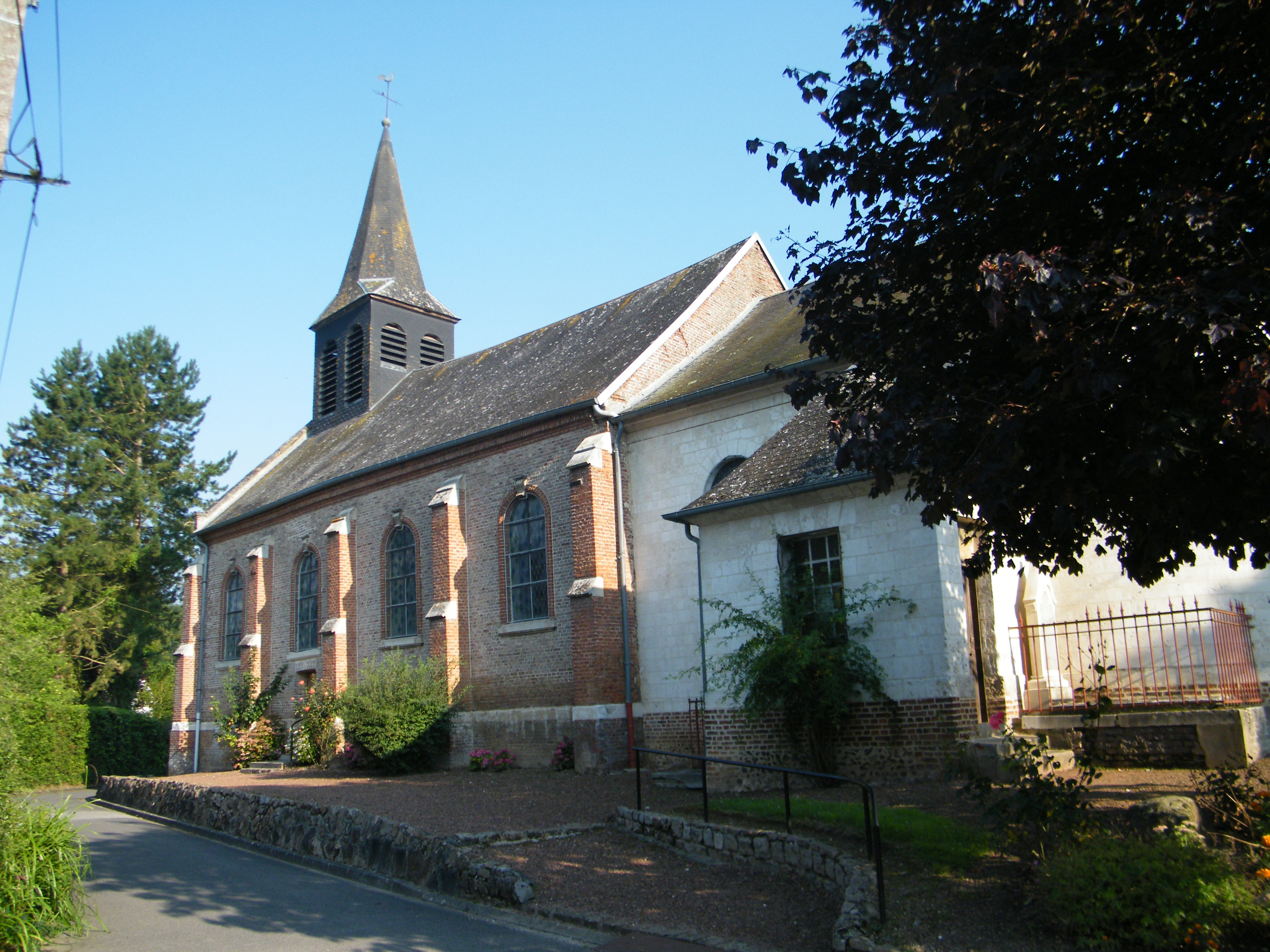 église.